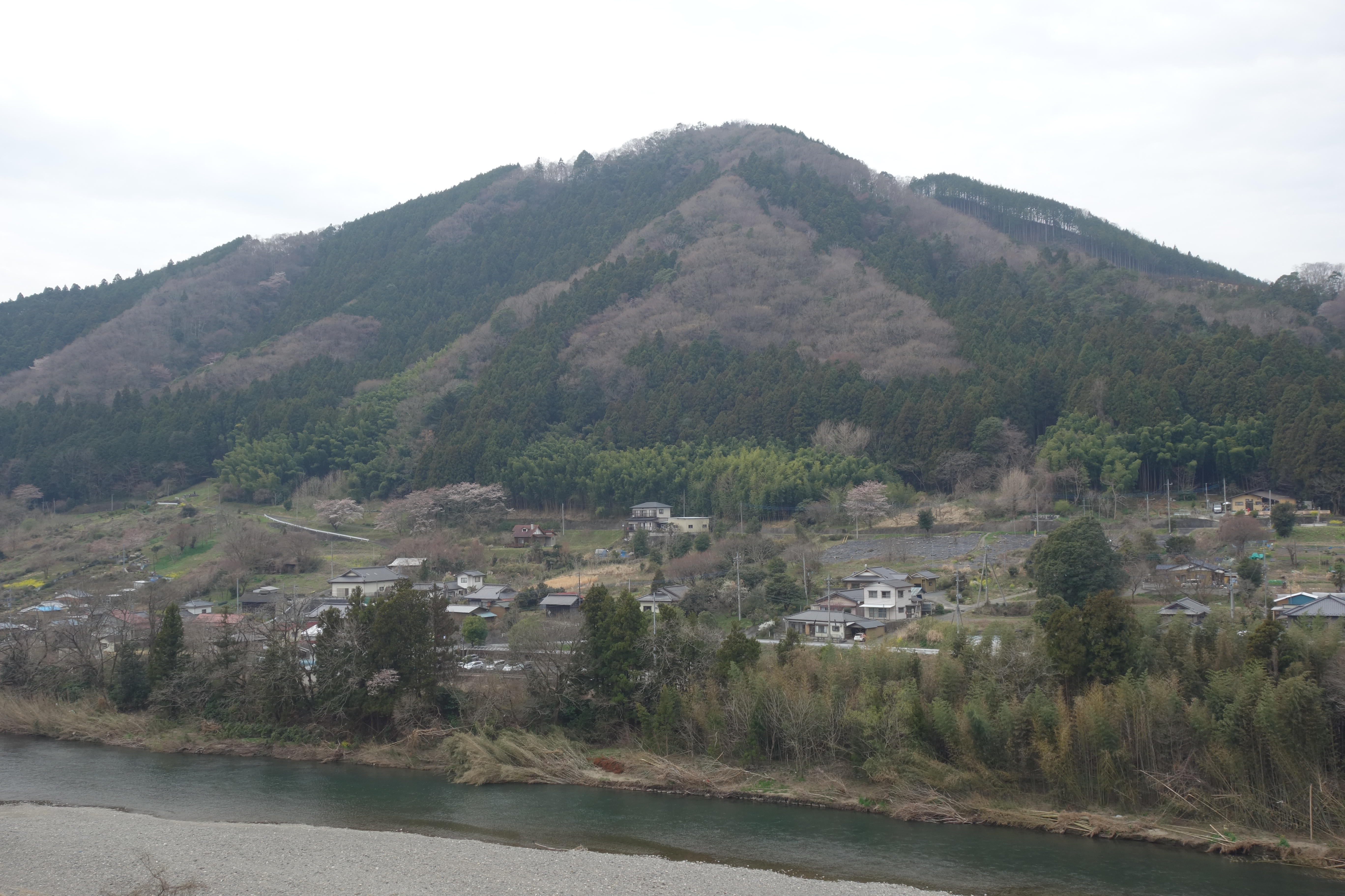 国道118号からの盛金富士